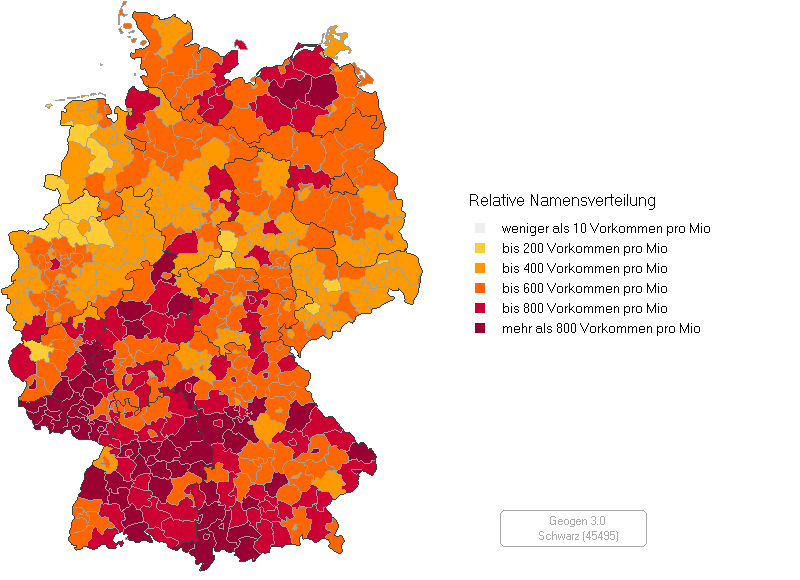 Relative Häufigkeit des Familiennamens Schwarz in Deutschland